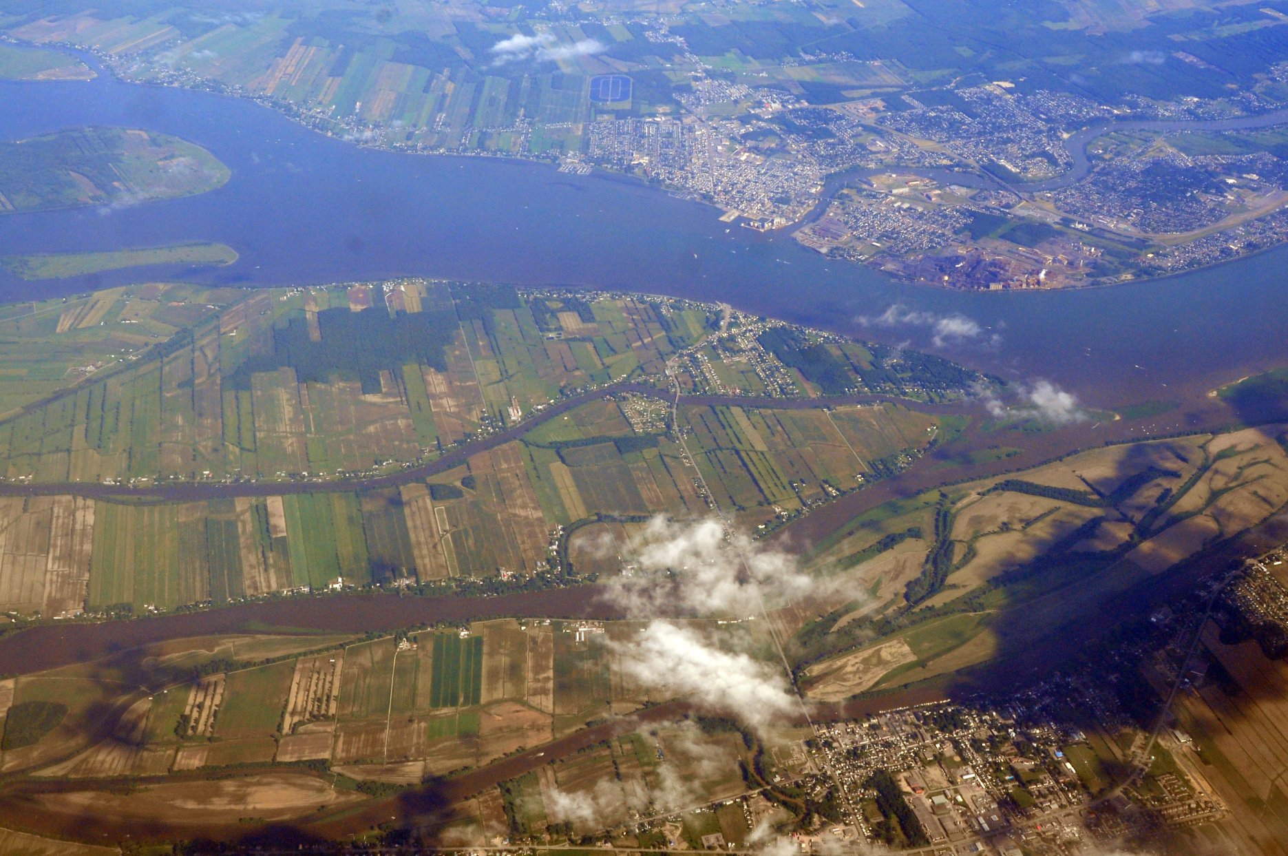 Le Saint-Laurent près de Sorel-Tracy, Québec